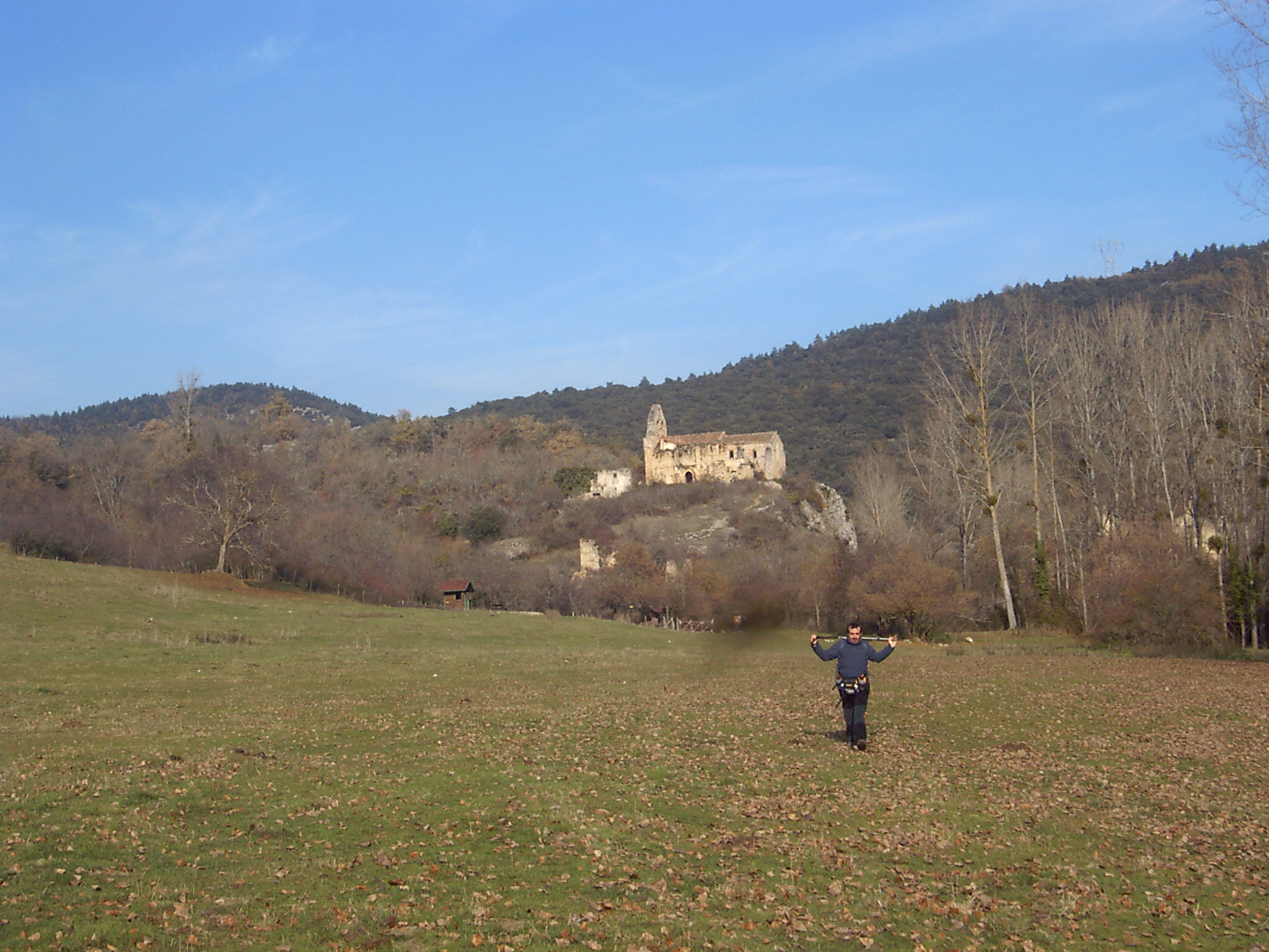 Valderejo natur parkeko baseliza